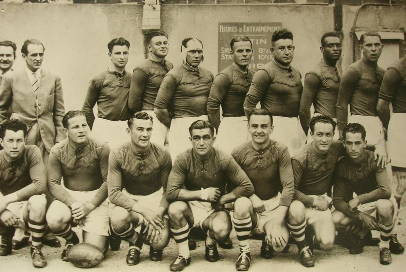 "La Grande Equipe" Fumel année 40s